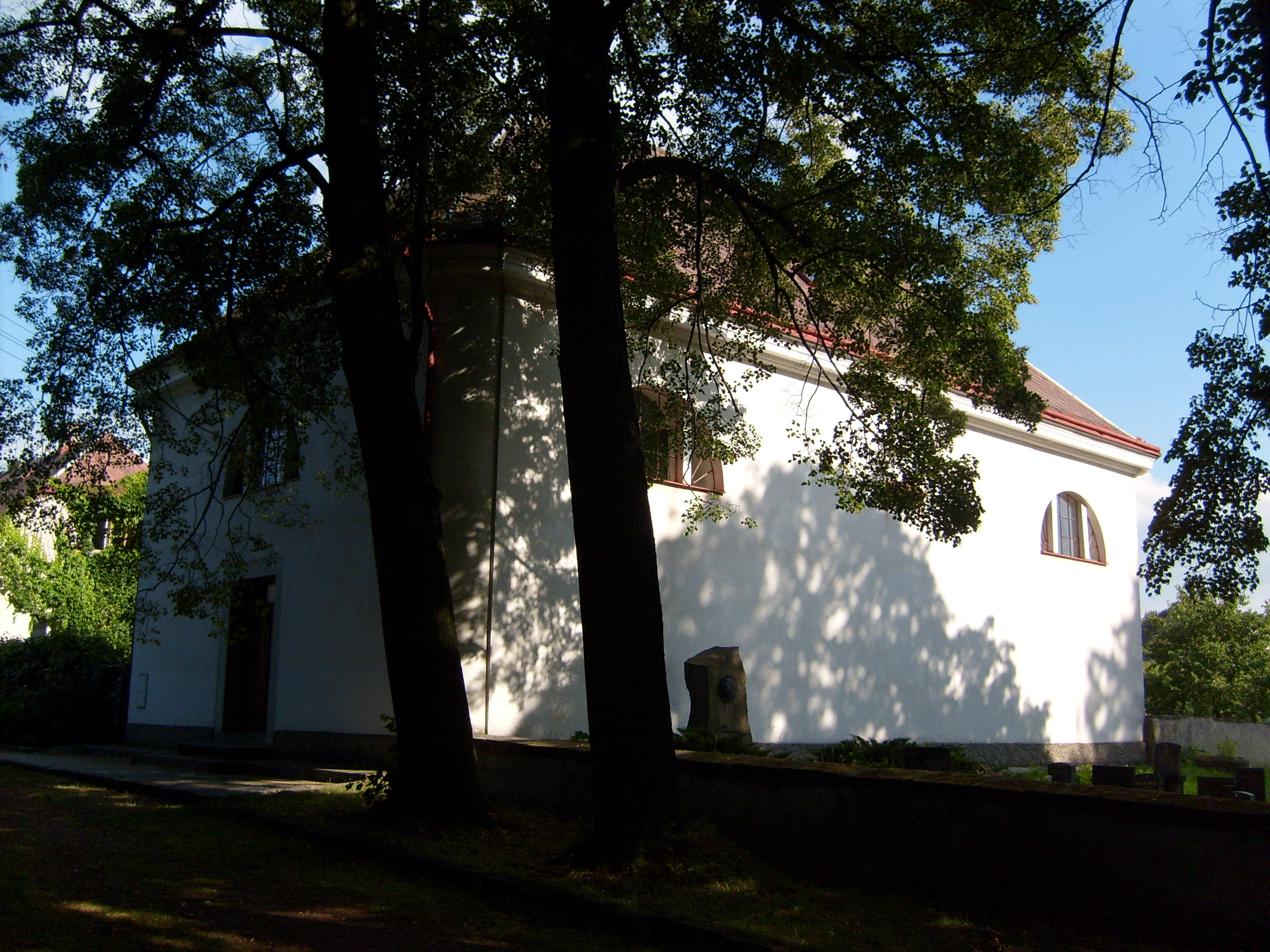 Evangelický toleranční kostel, Hradiště, České Lhotice, Pardubice Region, Czech Republic